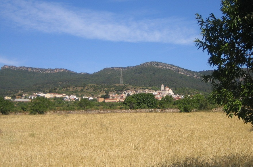 Vista de Miramar des de Figuerola